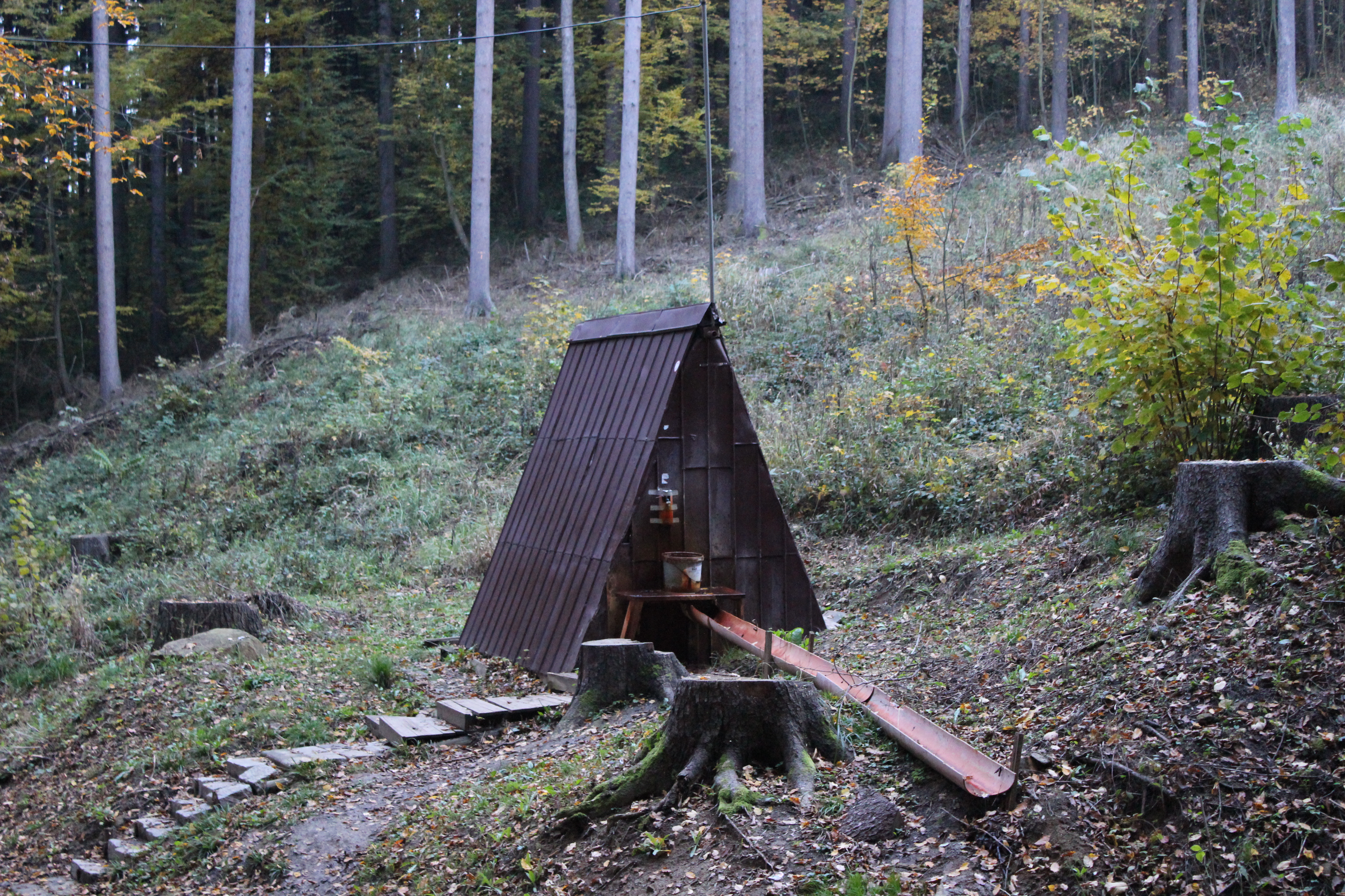 Pramen Viola v Luhačovicích.